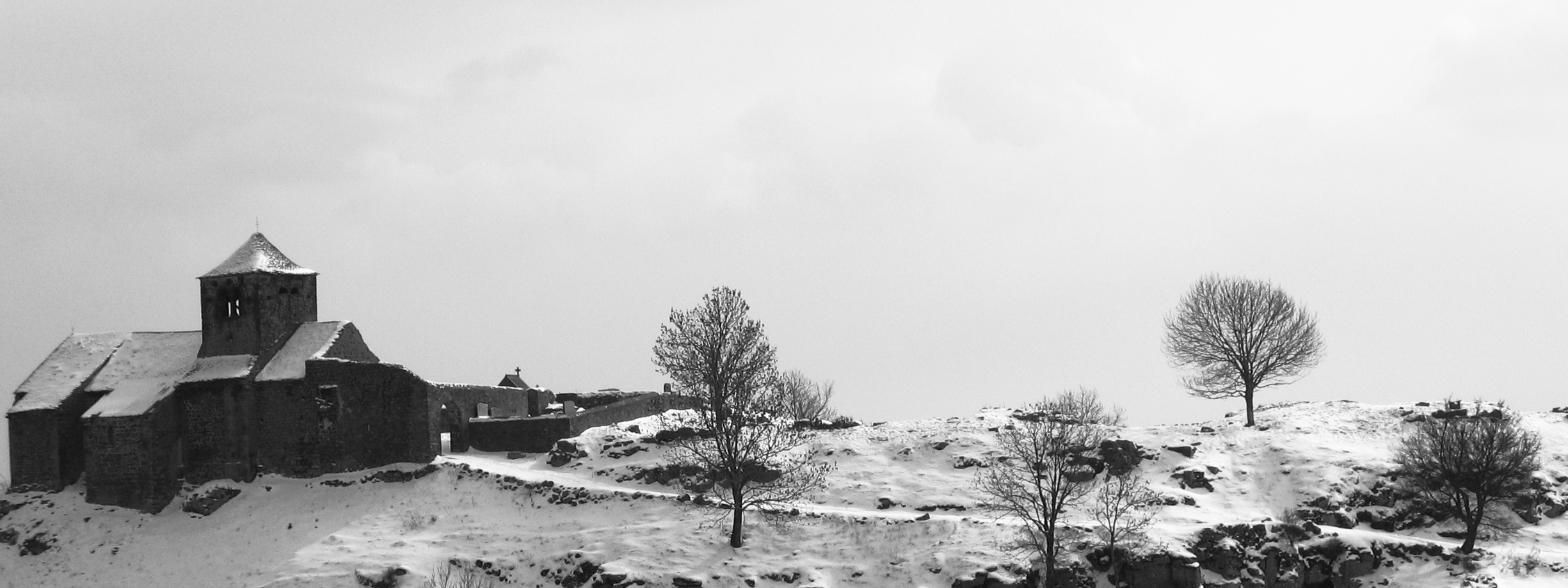 Dauzat-sur-Vodable, Puy-de-Dôme, Auvergne, France